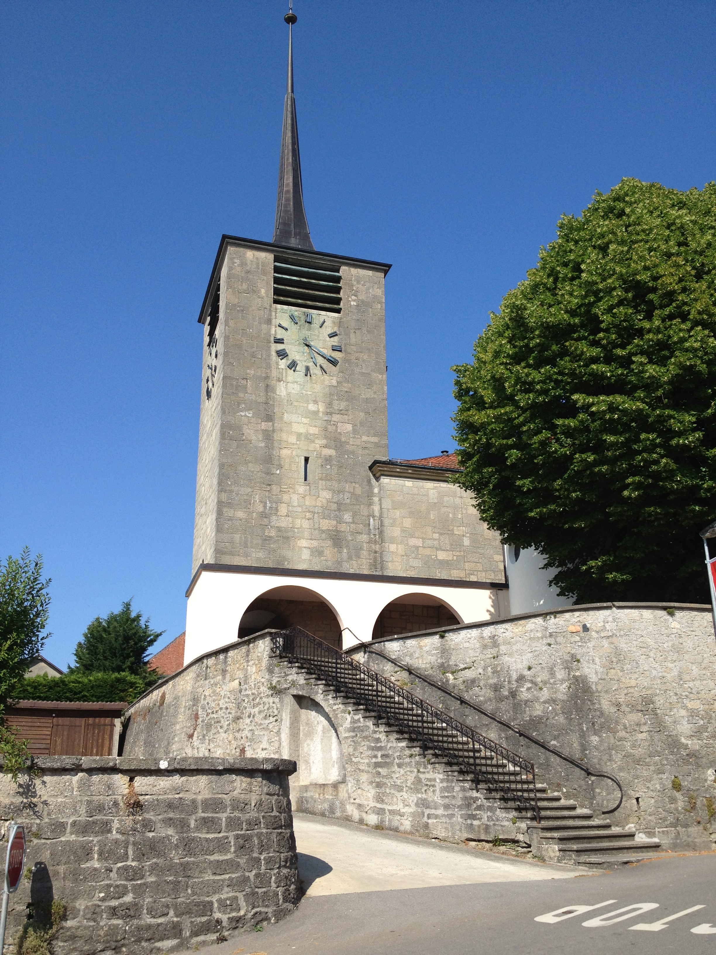 L'église de Murist dans le canton de Fribourg en Suisse.